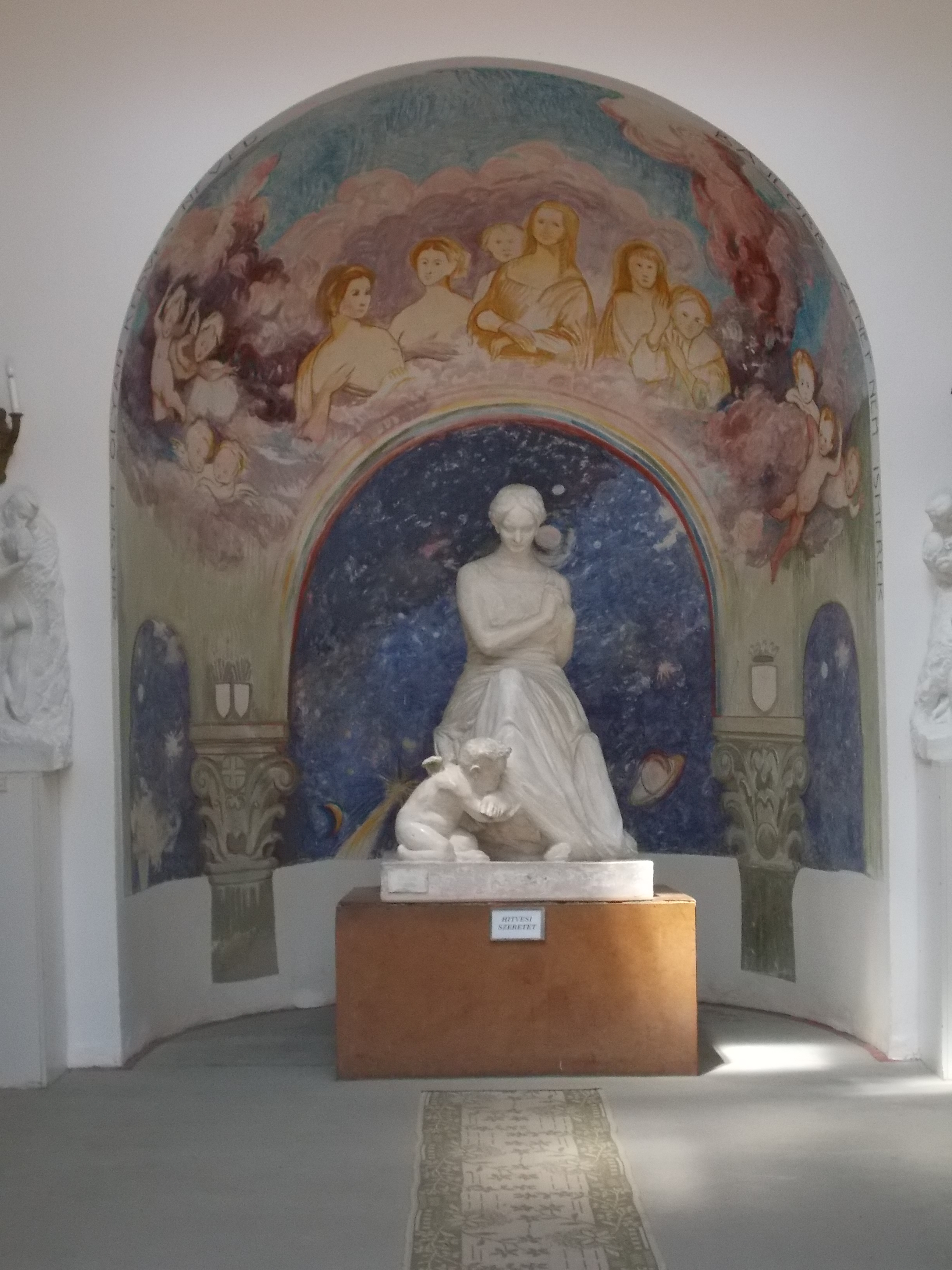 Bory vár. Kápolna. - Magyarország, Fejér megye, Székesfehérvár, Öreghegy, Máriavölgy út 54